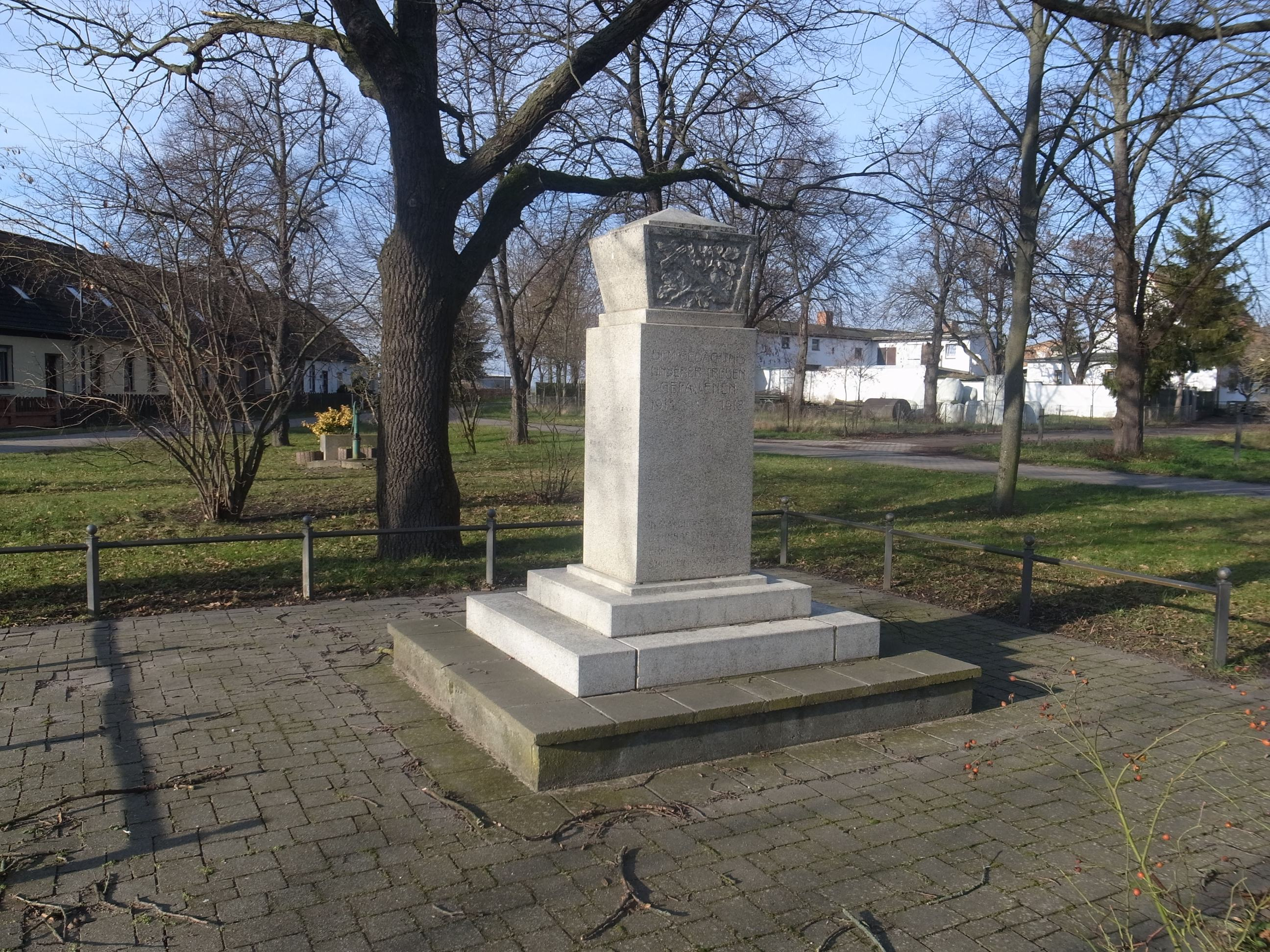 Patzetz, Gefallenendenkmal I.Weltkrieg